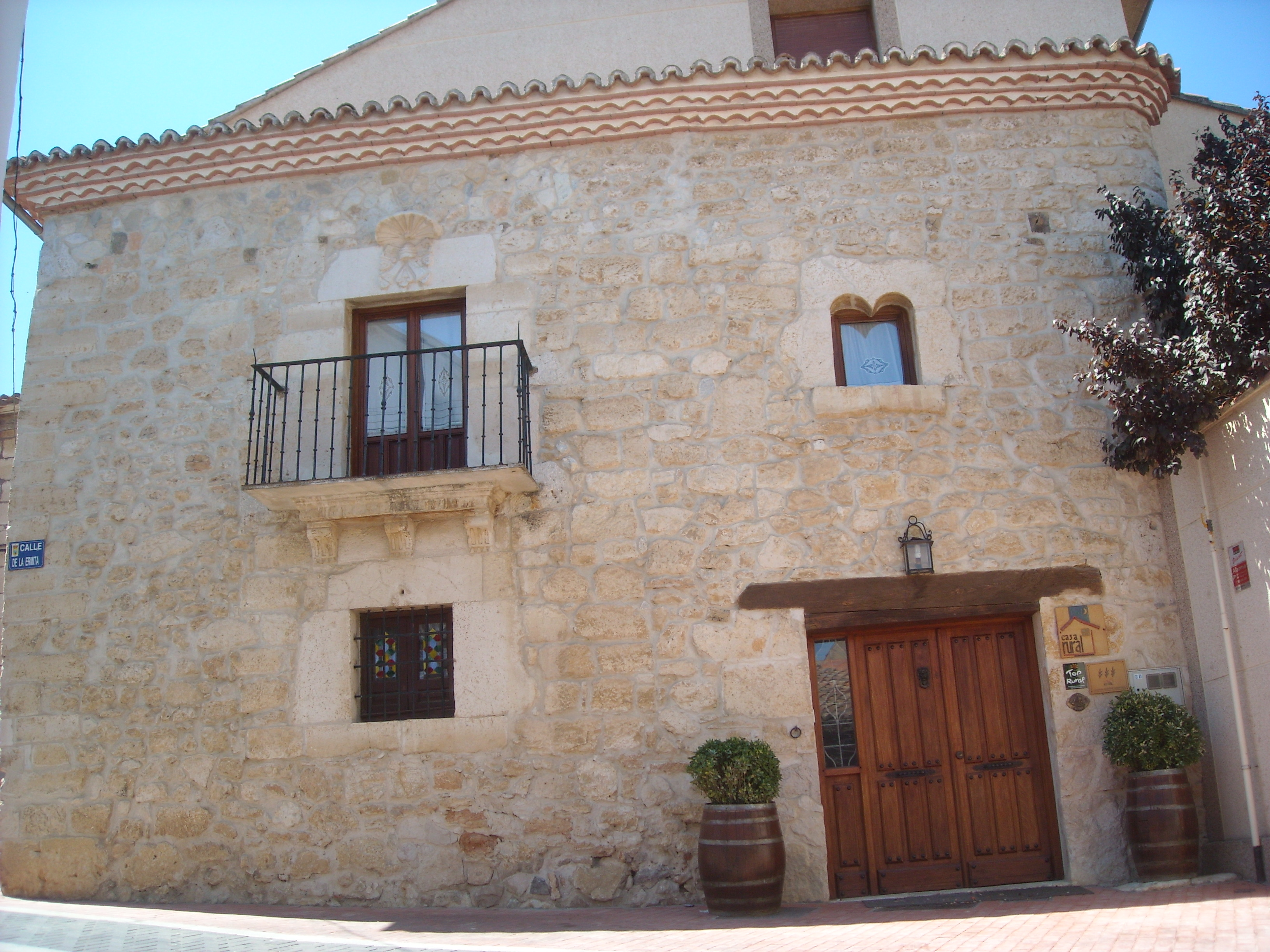 Ermita de Santa María de la Cruz, hoy convertida en una casa rural.